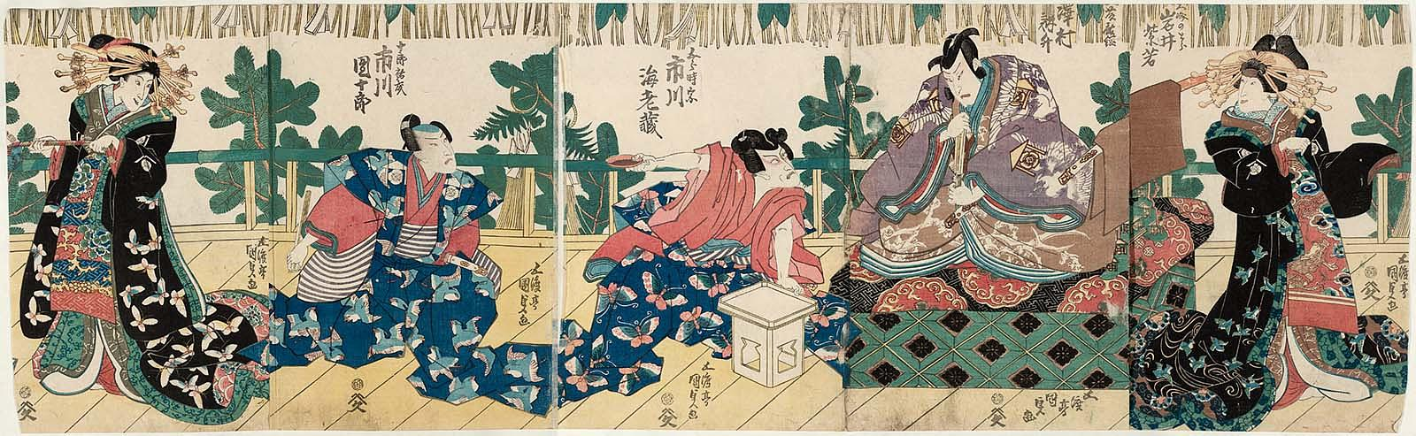 Kabuki Scene from "Koi-zumô Yawaragi Soga" （『恋相撲和合曽我』）